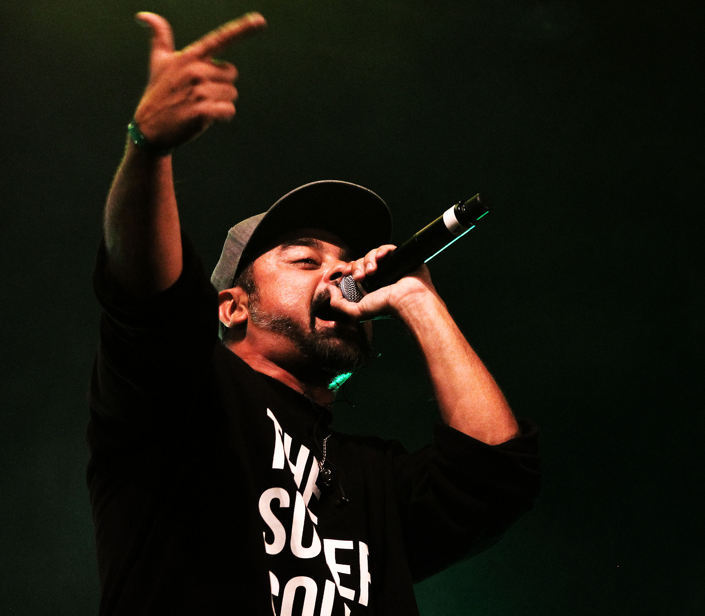 VII Festival Solidario Aspaym 2014